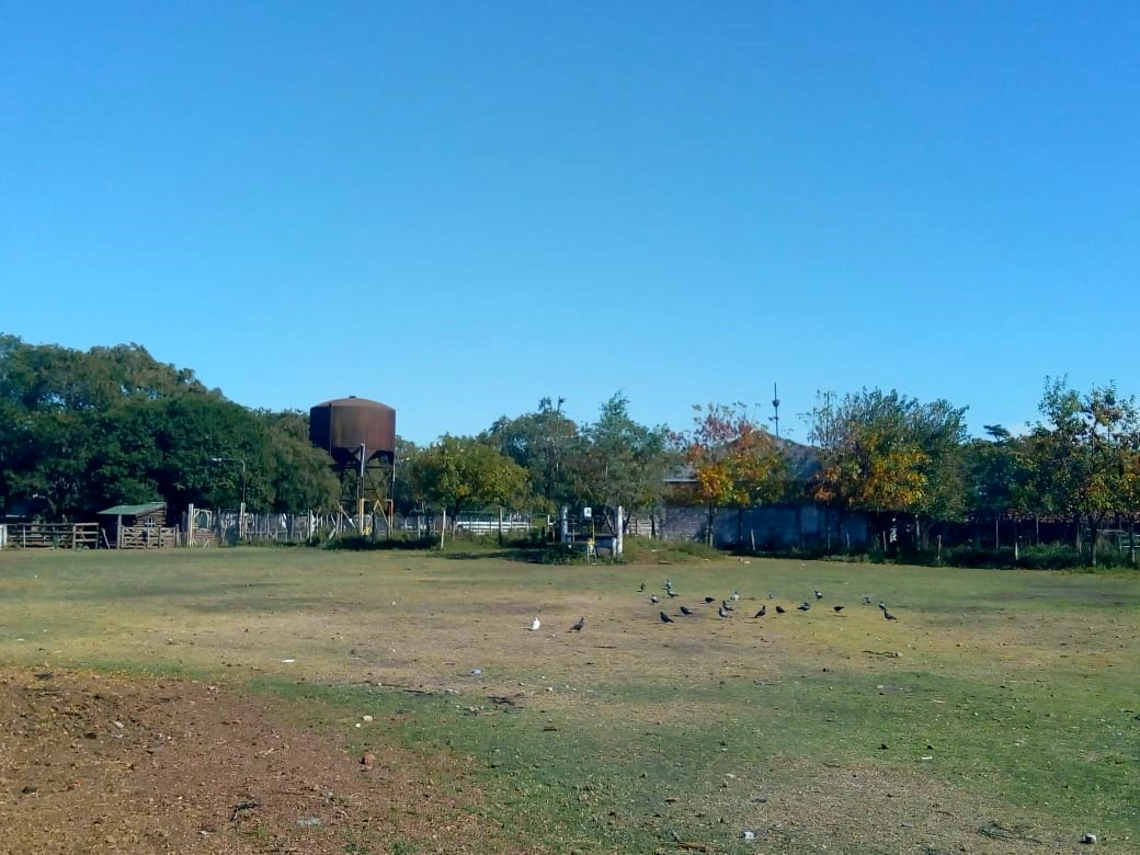 Florencio Varela